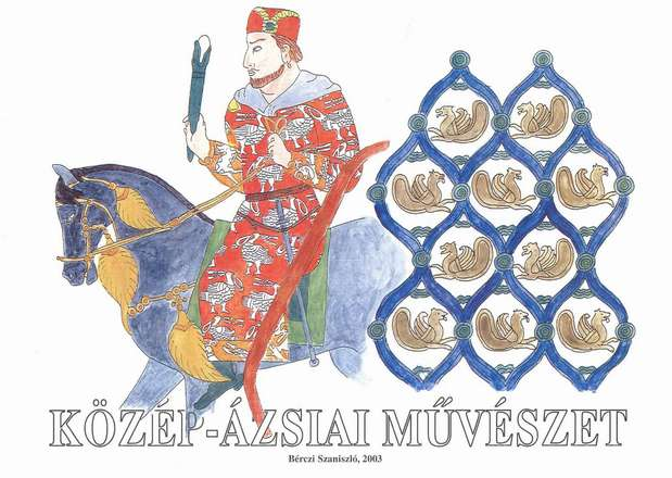 Közép-ázsiai művészet ábrája